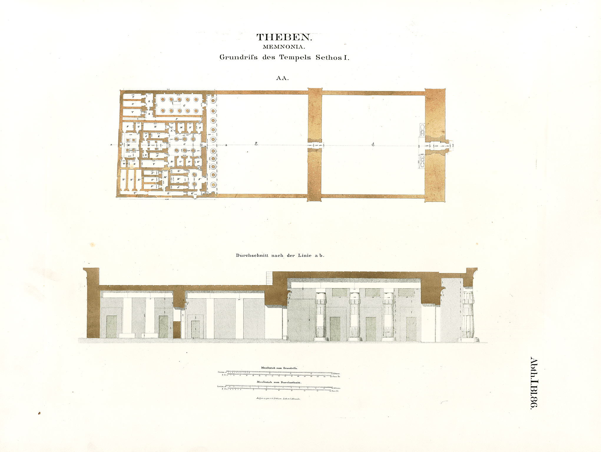 Denkmaeler aus Aegypten und Aethiopien nach den Zeichnungen der von Seiner Majestät dem Koenige von Preussen, Friedrich Wilhelm IV., nach diesen Ländern gesendeten, und in den Jahren 1842–1845 ausgeführten wissenschaftlichen Expedition auf Befehl Seiner Majestät